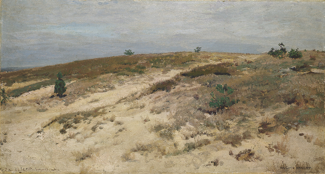 Landschaftsdarstellung der Heide in Neu Zittau bei Berlin